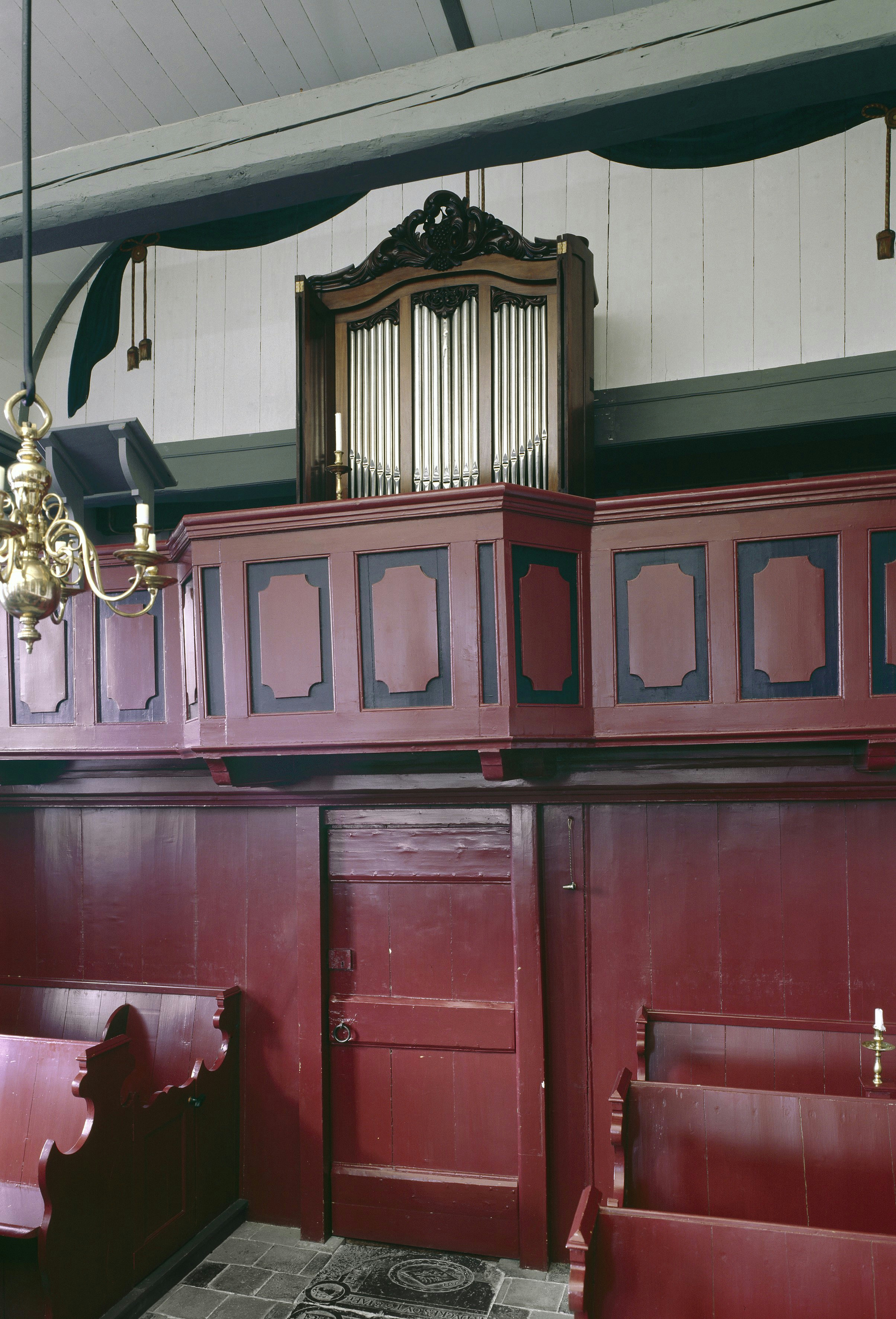 Nederlands Hervormde Kerk: Intenieur, aanzicht orgel, orgelnummer 756 (opmerking: Gefotografeerd voor Het Historische Orgel in Nederland 1872-1878, bladzijde 63)